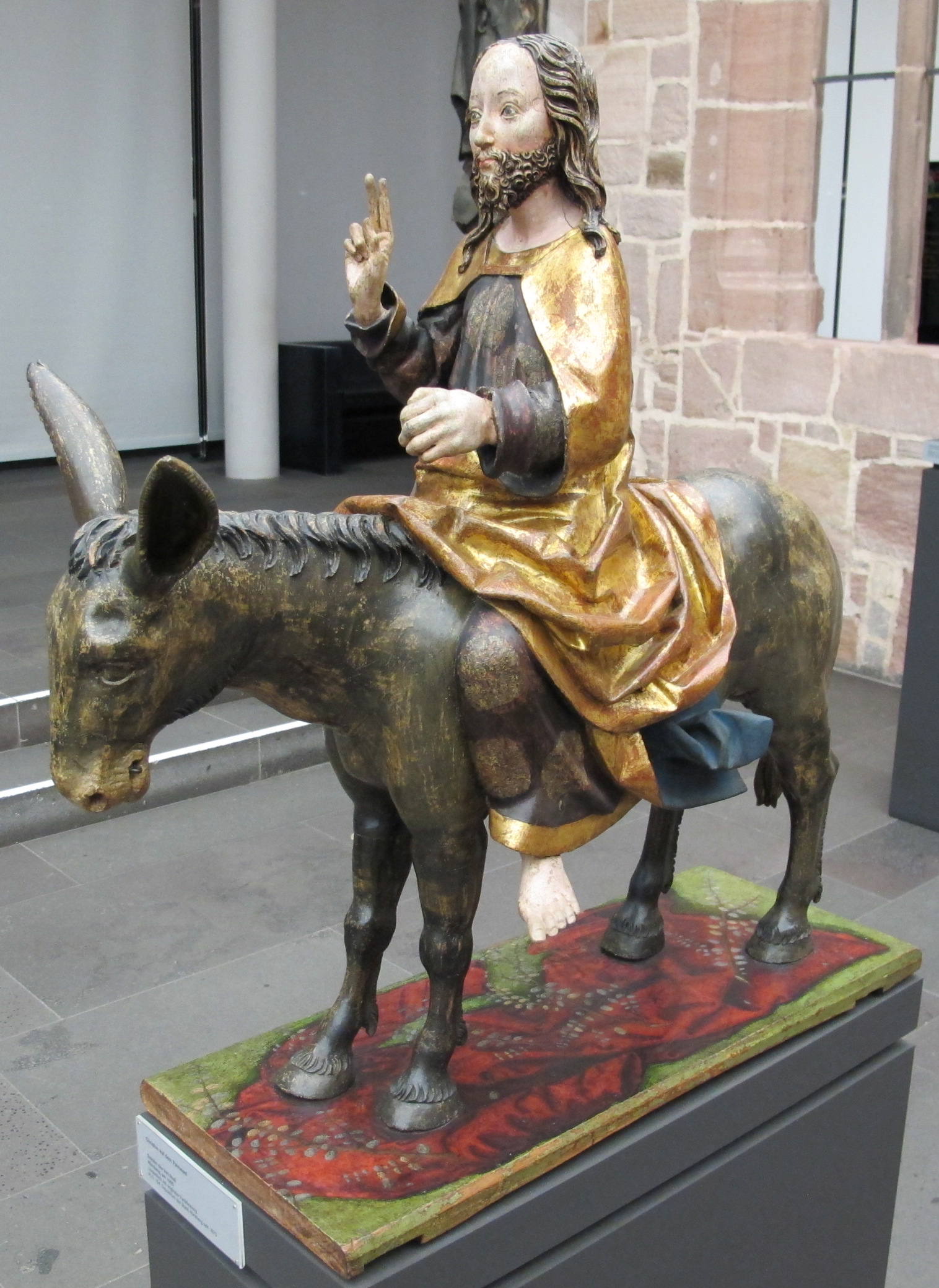 Palmesel, 1505 ca